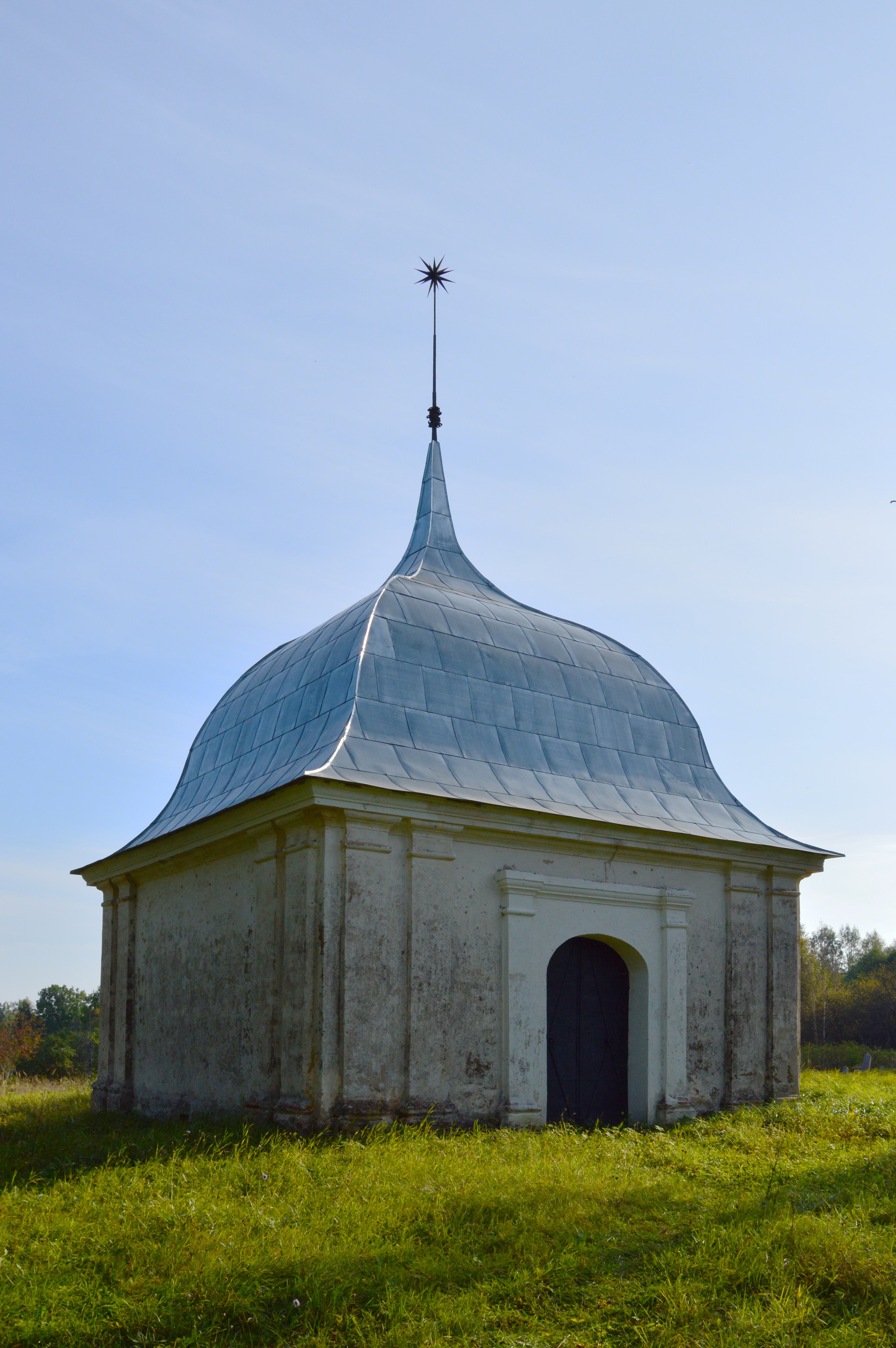 Vastseliina mõisa kabel